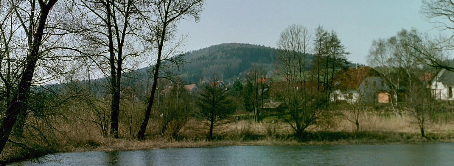 Hochstein bei Kleindehsa (Oberlausitzer Bergland)